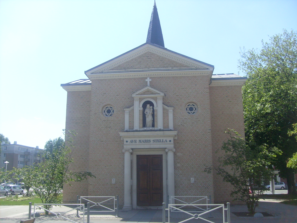 Chapelle Notre Dame des Dunes à Dunkerque